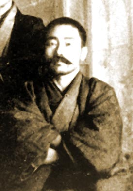 a Japanese man, Goto Chugai